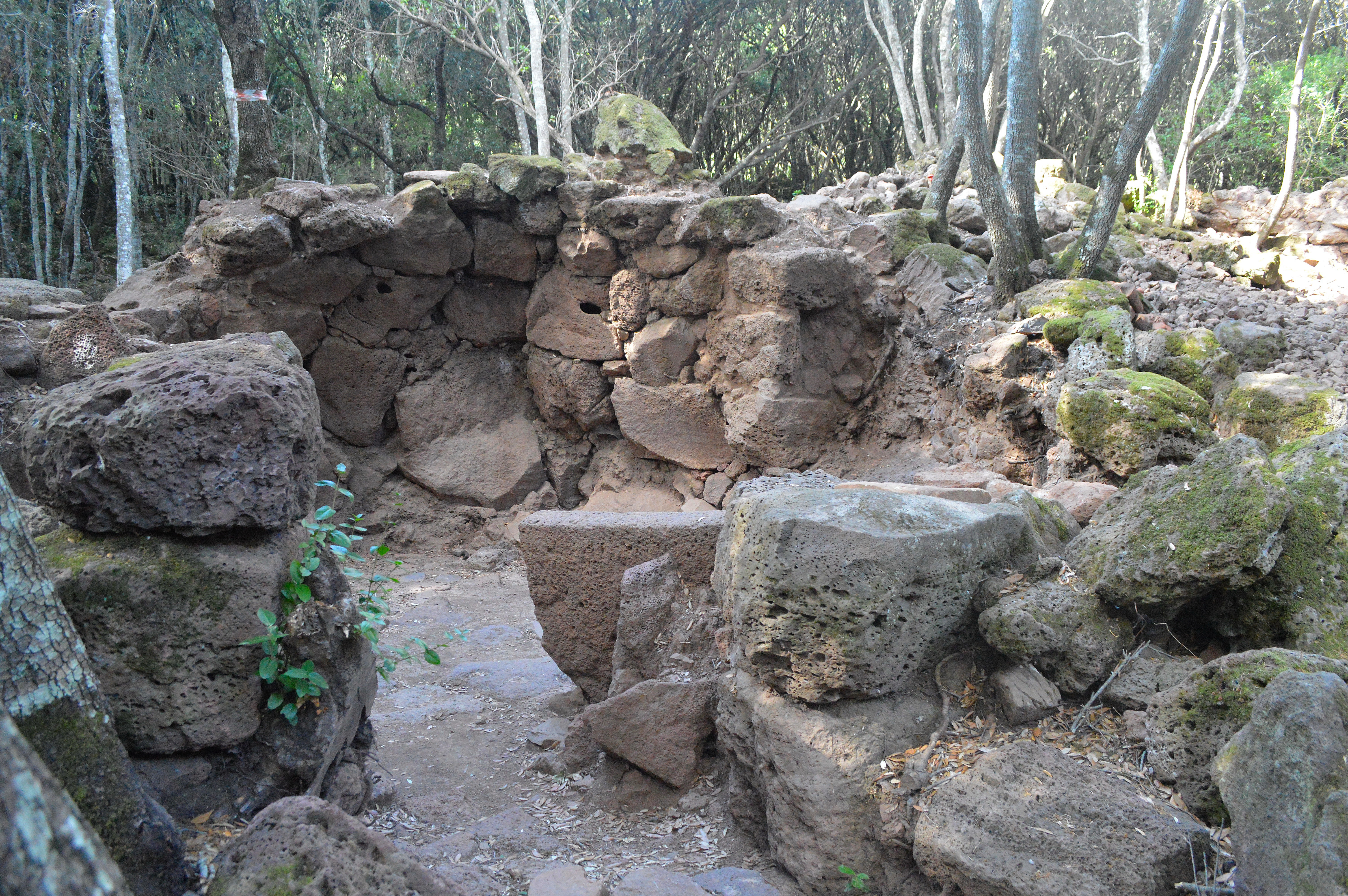 Villaggio nuragico di Brunku 'e S'Omu This is a photo of a monument which is part of cultural heritage of Italy.